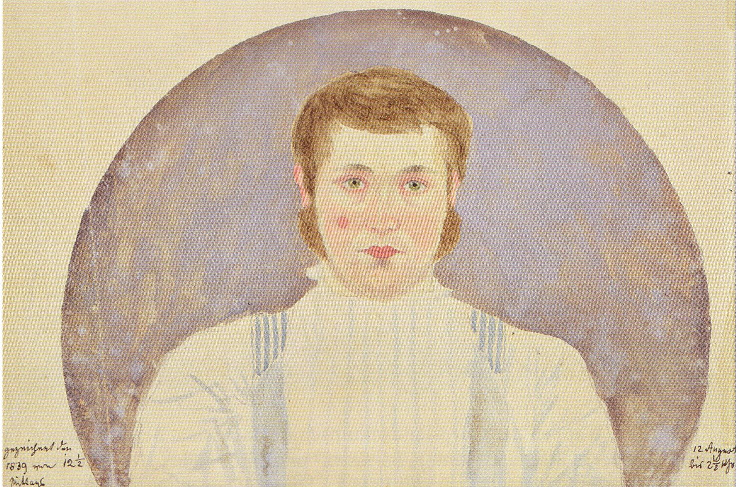 seitenverkehrtes Selbstbildnis von Wilhelm Schmiedeberg